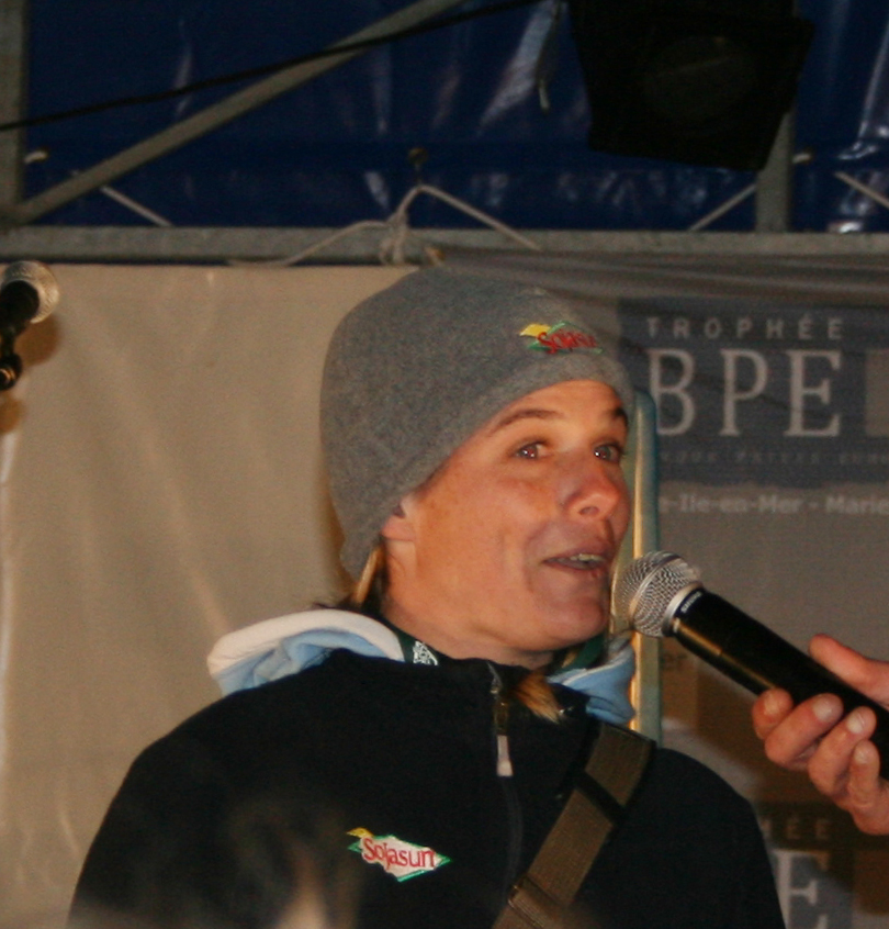 Description =Liz Wardley. Soirée présentation des skippers a Belle-Ile lors du Trophée BPE Source =Photo taken by Remi Jouan Date =Mars 2007 Author =Remi Jouan